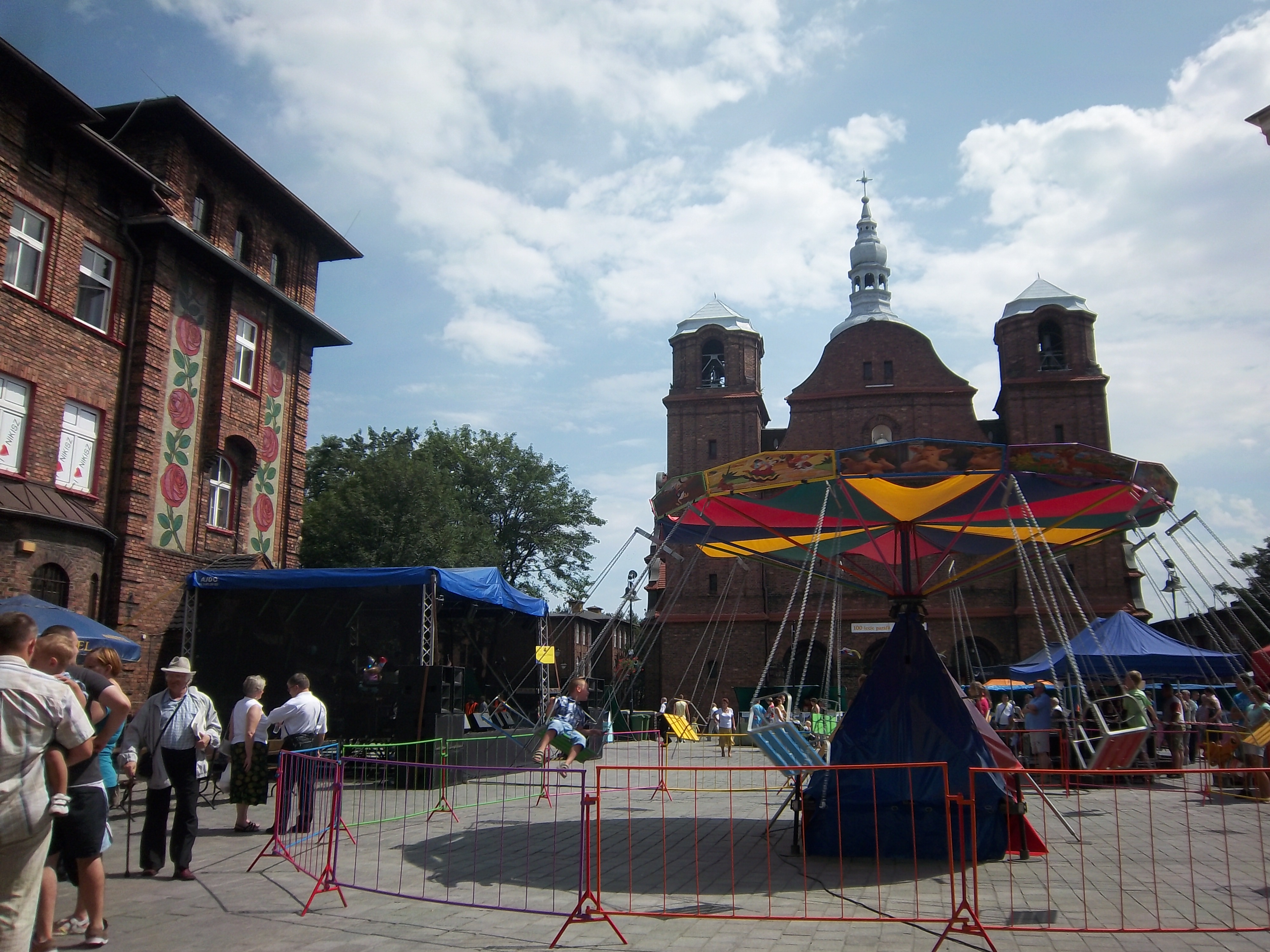 Osiedle robotnicze z lat 1908-1918, obejmujące ulice: księdza Ficka, Giszowiecka, Odrowążów, Czechowa, Janowska, świętej Anny, Garbarska, Rymarska, Nałkowskiej, Szopienicka, Plac Wyzwolenia Katowice, Nikiszowiec, Katowice 08.1978.